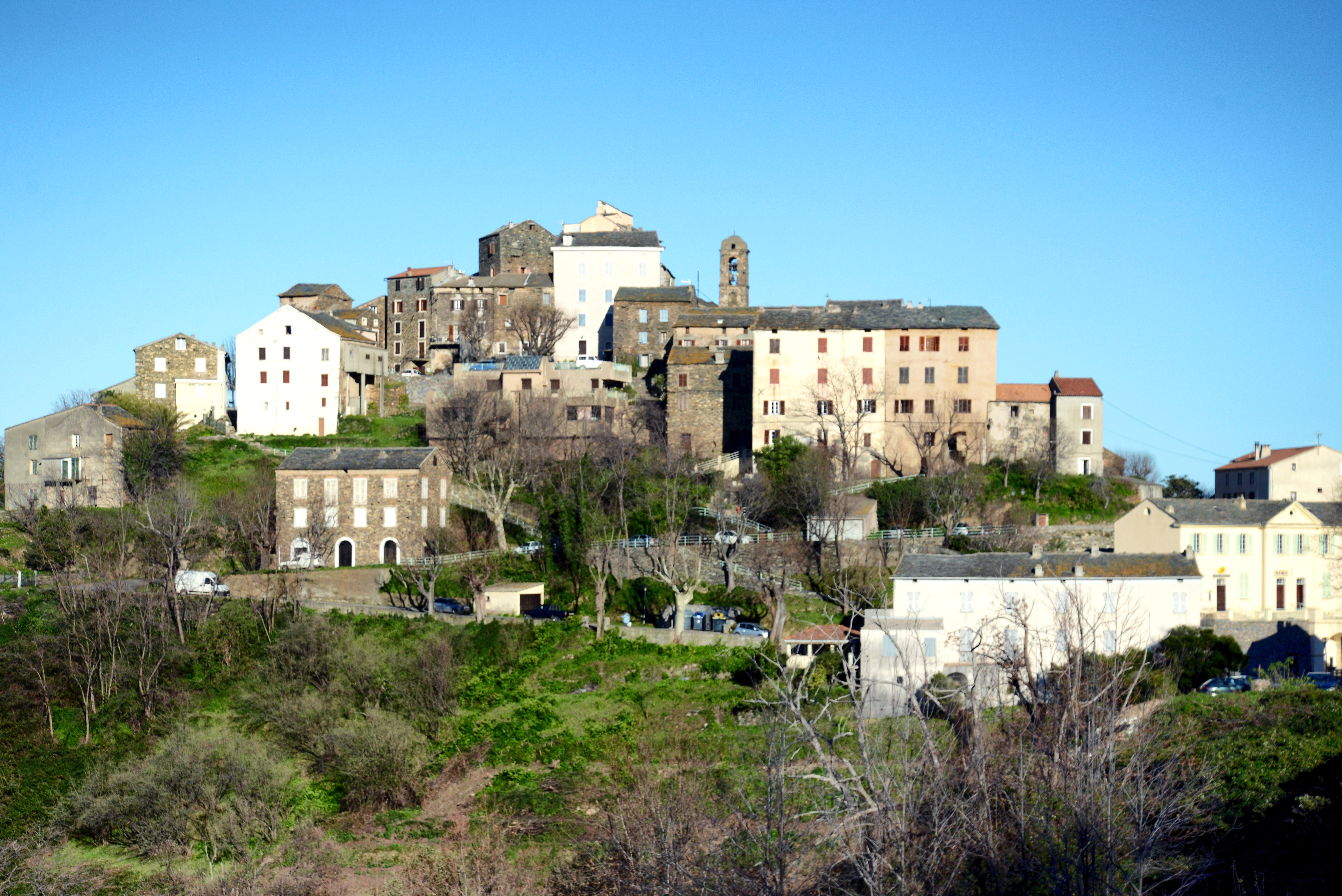 Castellare-di-Casinca, Haute-Corse - Vue du village aux habitations regroupées autour de l'église paroissiale Saint-Sébastien